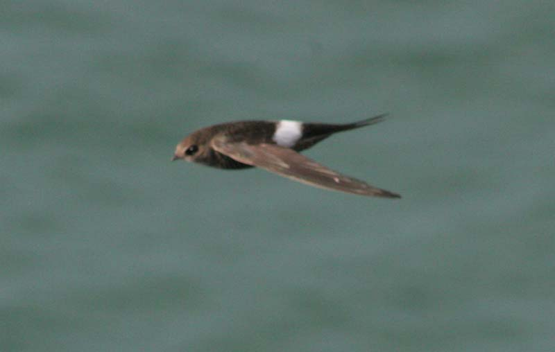 Apus pacificus